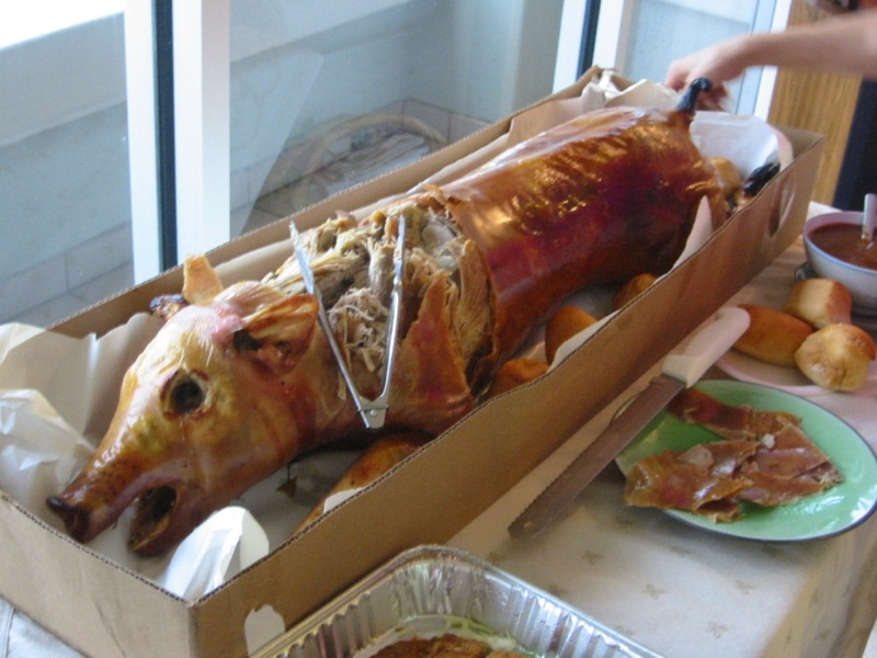 Roasted pig siu mei Chinese roasted pig